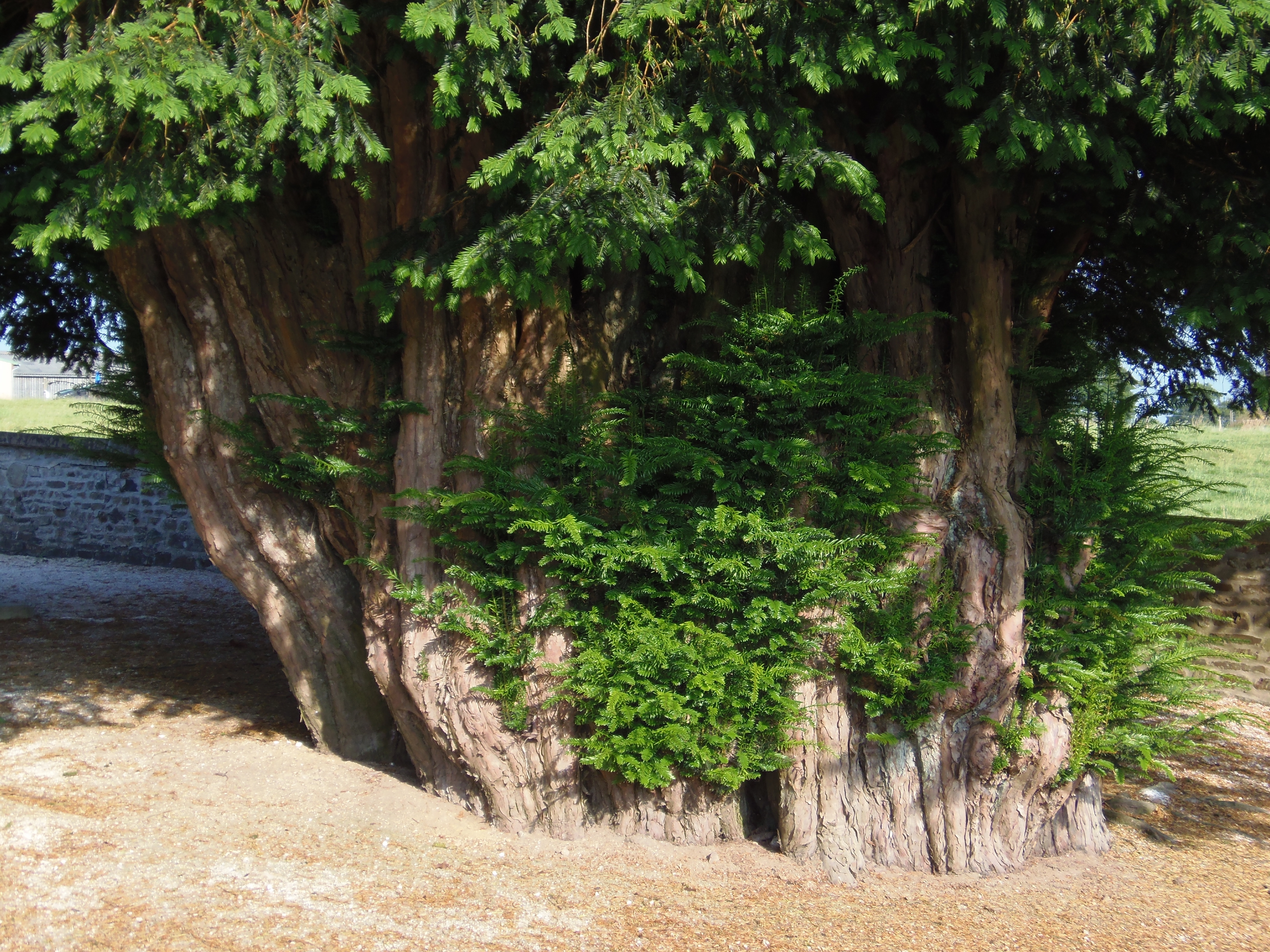 Le Ménil-Ciboult (Normandie, France). L'if du cimetière.